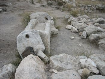 A manger in Meggido, part of the stables (probably around 850 BCE) / Jasle (hranilica za stoku) iz Megida, dio štala (vjerojatno oko 850. pr.Kr.).